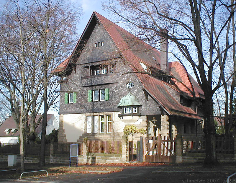 Villa Pielenz in der Wollhausstr. 93 in Heilbronn